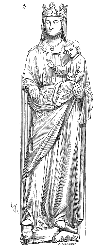 ... Pour faire saisir ces transformations, vers le naturalisme, de l'image de la sainte Vierge, nous donnons, figure 2, celle de la porte de droite de la face occidentale de Notre-Dame d'Amiens, qui date du commencement du XIIIe siècle, et figure 3, celle du portail de la Vierge dorée de la même église, qui date de la fin de ce siècle. La première figure est grave, elle étend la main en signe d'octroi d'une grâce. L'Enfant bénit; sa pose est, de même que celle de la mère, calme et digne. La seconde est tout occupée de l'Enfant, auquel s'adresse son sourire ...